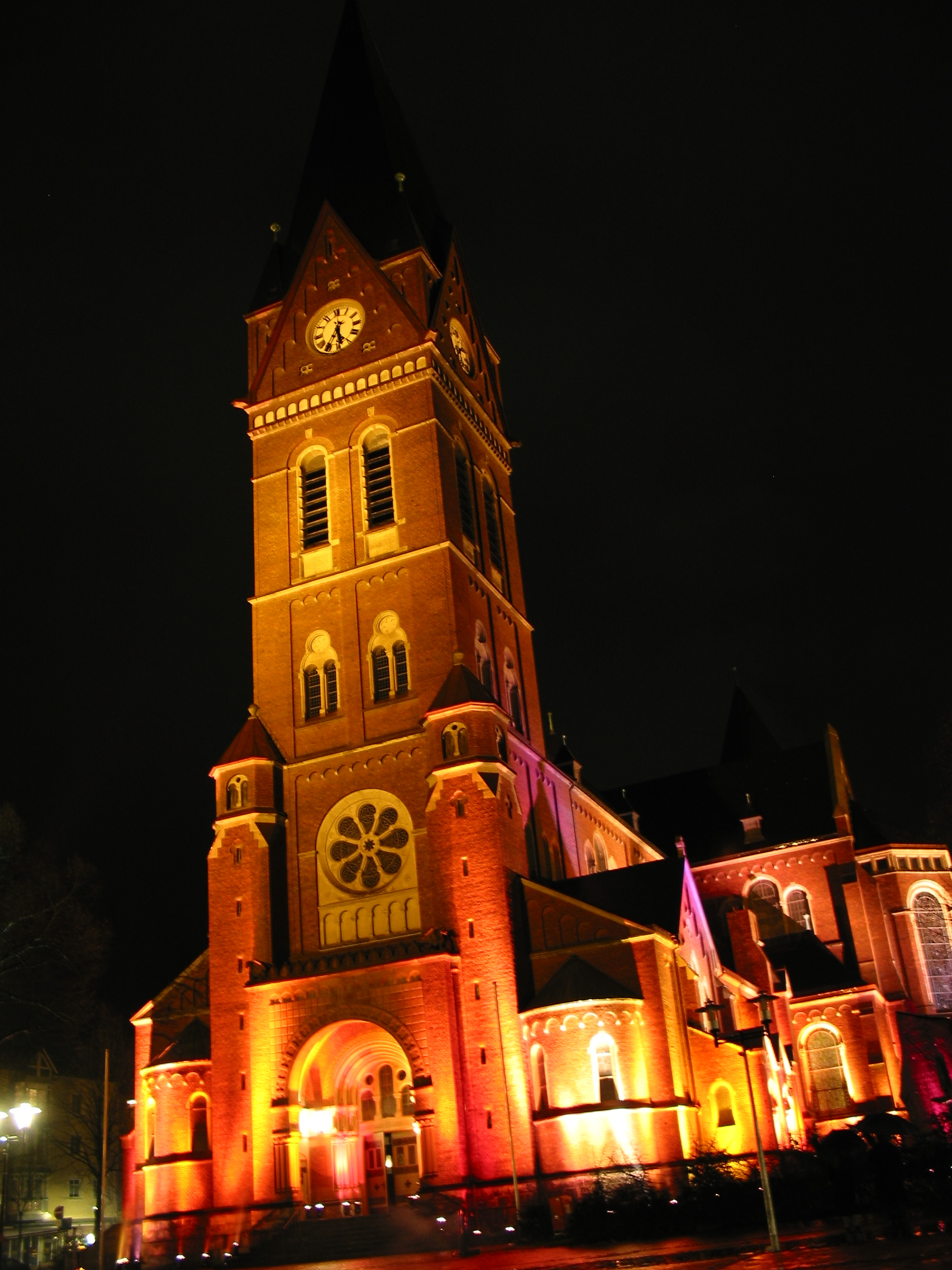 Pfarrkirche St. Johannes Bapt. Neheim Aufnahme vom 12.2003 Urheber: von Trompes aufgenommen